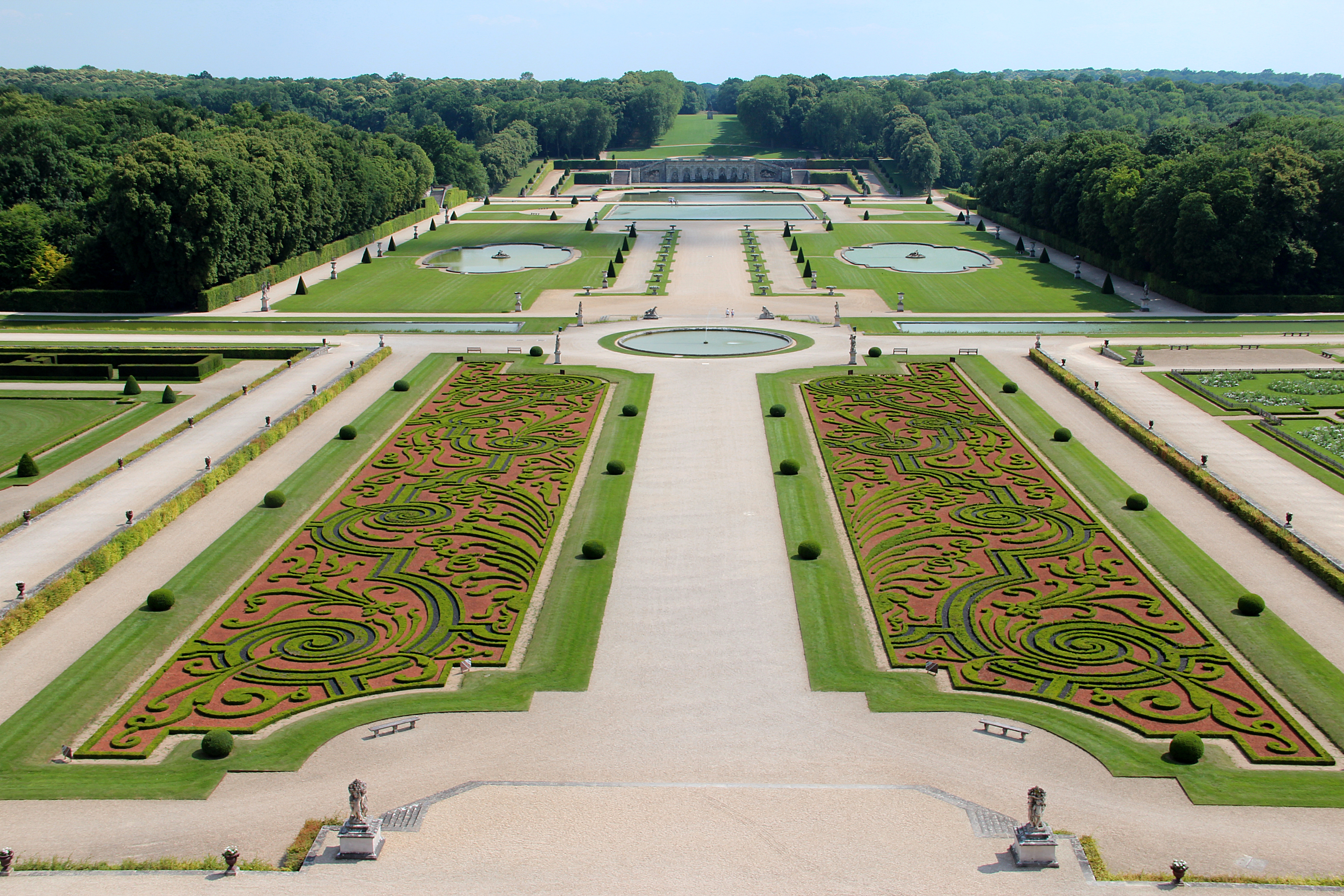 La longue perspective sur les jardins baroques, les parterres, les pièces d’eau et les canaux vus du lanternon du château de Vaux-le-Vicomte - Maincy (Seine-et-Marne, France).